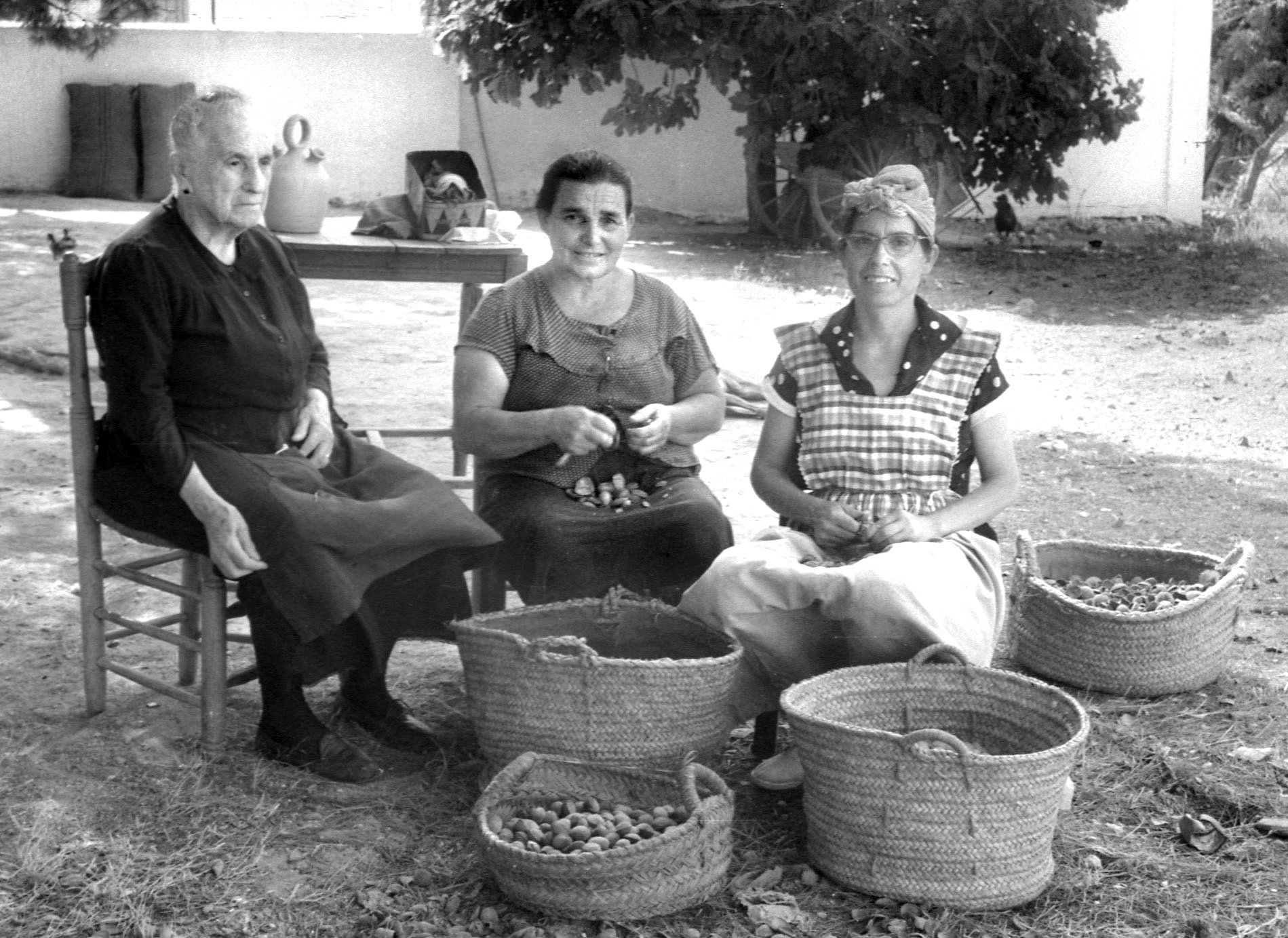 Imatge d'Ismael Latorre Mendoza, Alginet, 1959-08-11 Imatge editada en: El correu de dijous, La força de la dona, pàgina 1, 10 març de 2005 El correu de dijous, La força de la dona, pàgina 3, 28 d'abril del 2005 Lozano, Josep i altres. Aljannat III. Monogràfic: Ismael Latorre Mendoza, any 2008. Edita: Ajuntament d'Alginet; ISSN 1886-984 X, pàgina 124. Levante, La fuerza de la mujer que retrató Latorre, 6-03-2016 Levante-emv-La Ribera: El maltrato a la mujer tiene mucha historia, 17-02-2019. Pàgina 37.